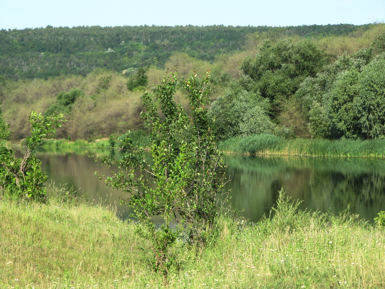 Вознесенський район, с.Бузьке, берег річки Південний Буг Миколаївська весна у Вікіпедії